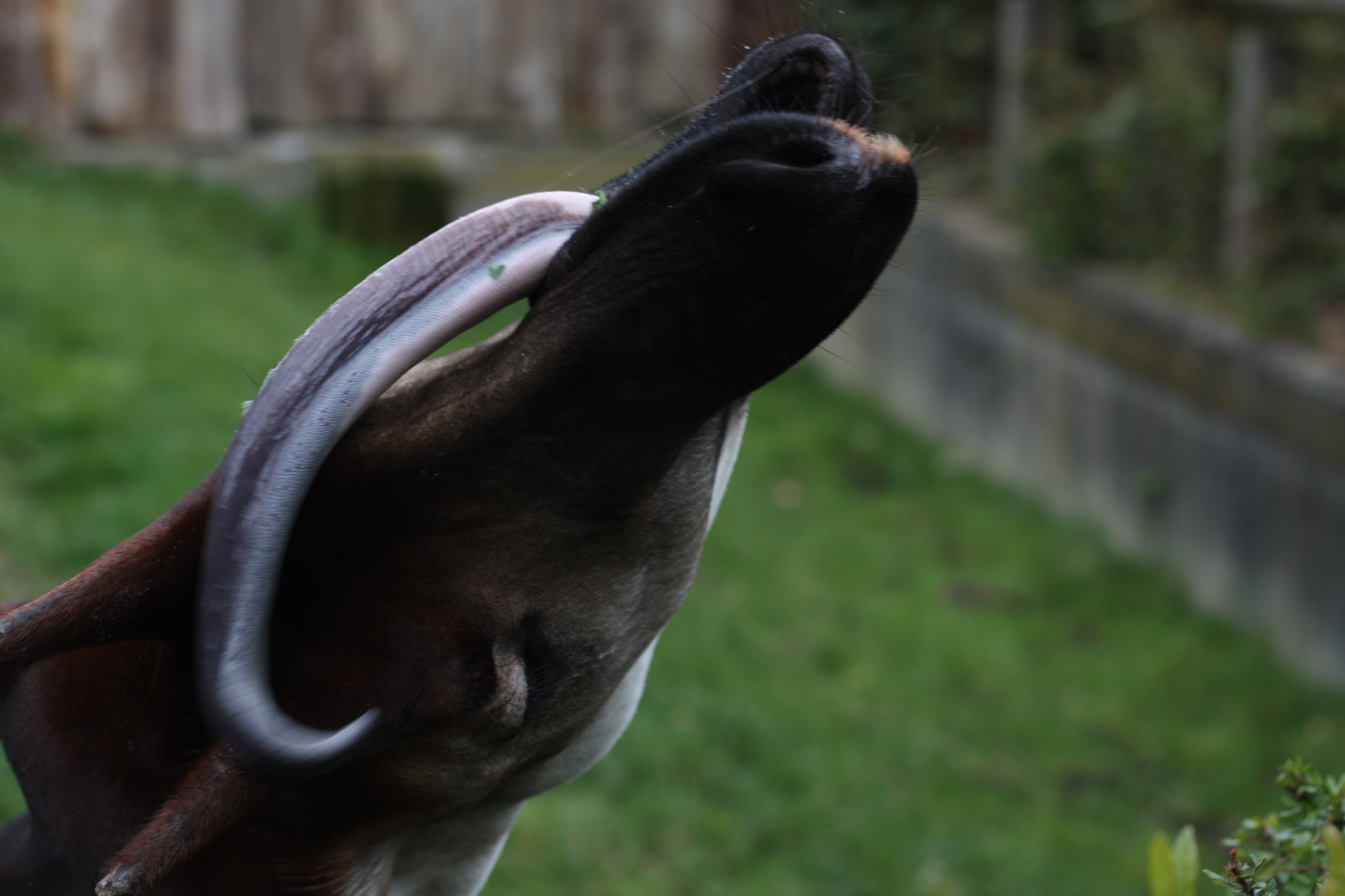 The okapi's long tongue!